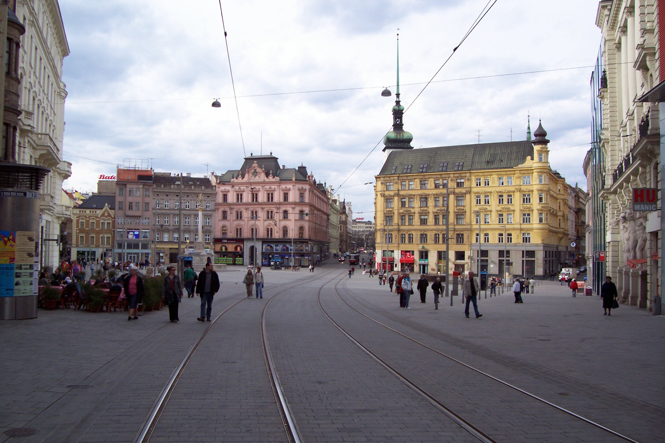 Město Brno, Náměstí Svobody